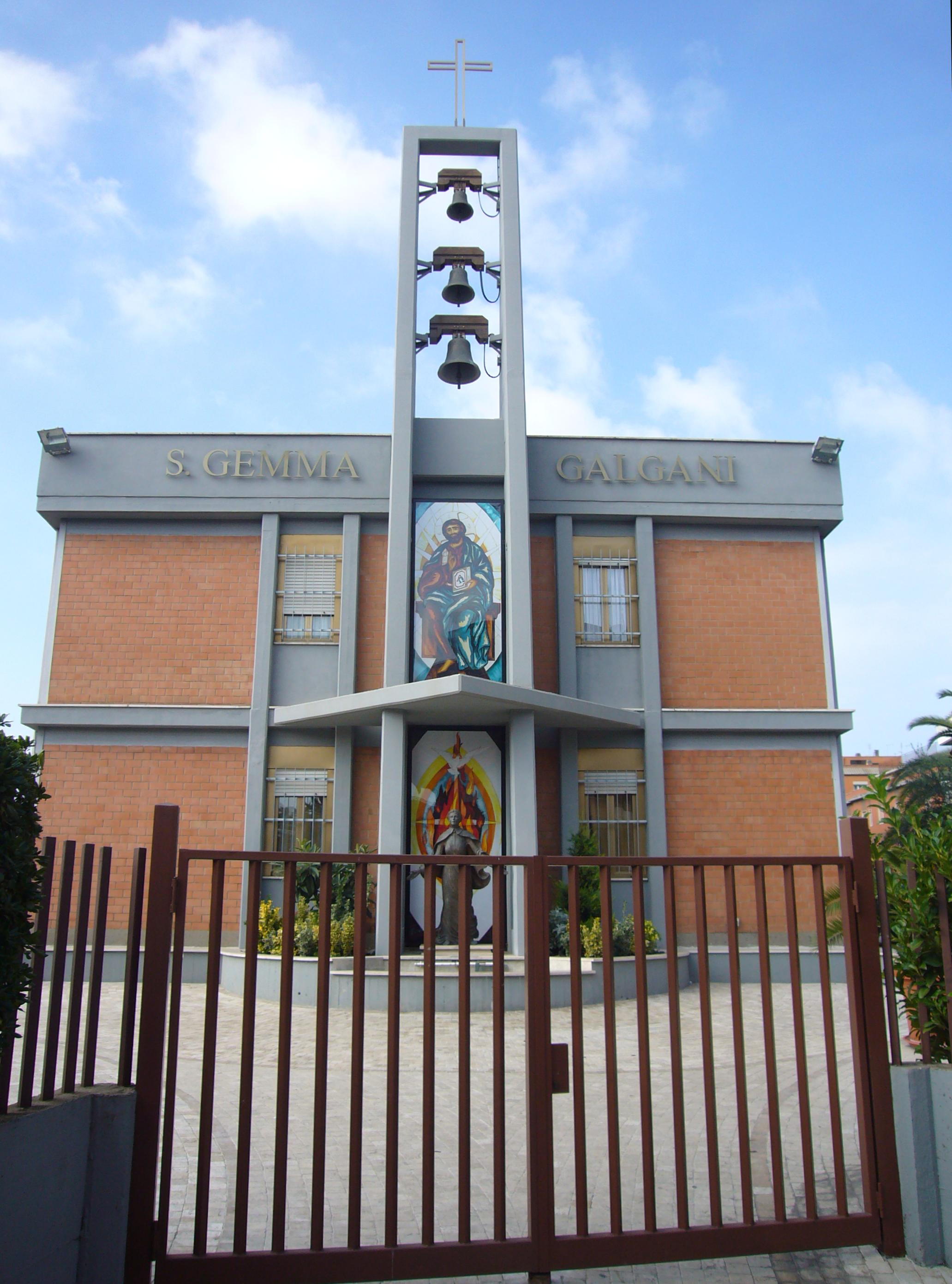 Roma, chiesa di santa Gemma Galgani (quartiere Monte Sacro)